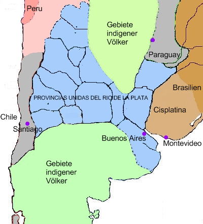 Provincias Unidas del Río de la Plata, 1821